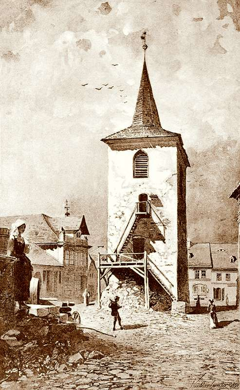 Solná věž na náměstí v Mladé Vožici (1891) Ottovy vlastivědné edice Čechy, díl VIII.: Táborsko, str. 43, Praha 1892